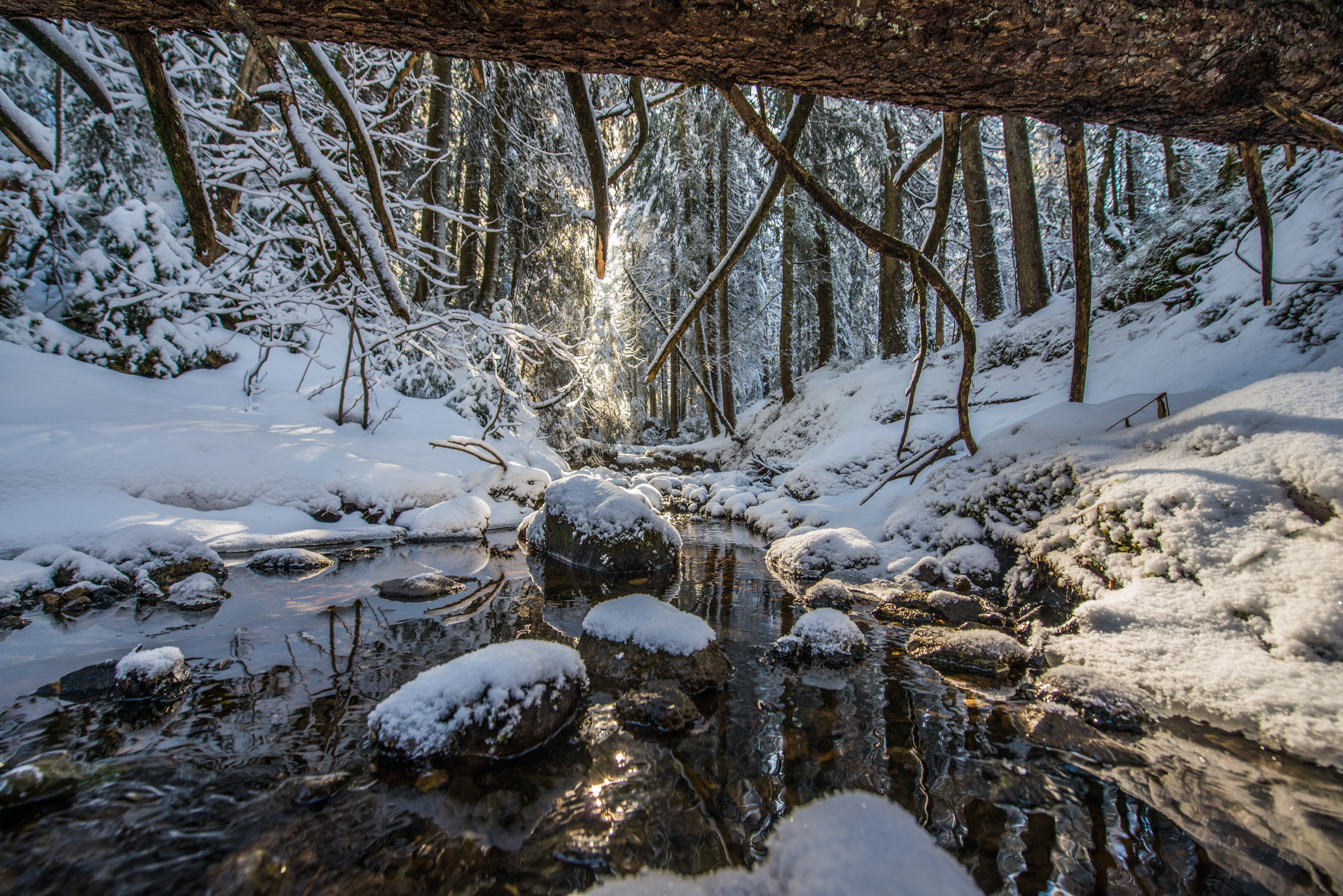 Lebensraum Foramoos (Bödele) This media shows the nature reserve in Vorarlberg with the ID 8007.